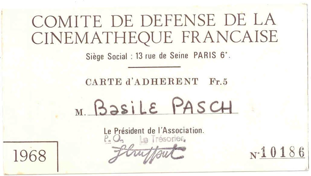 Carte de Basile Pachkoff, dit Pasch, membre du Comité de défense de la Cinémathèque française en 1968 au moment de l'Affaire Langlois. La cotisation est de 5 francs. Le trésorier du Comité est le réalisateur français François Truffaut.